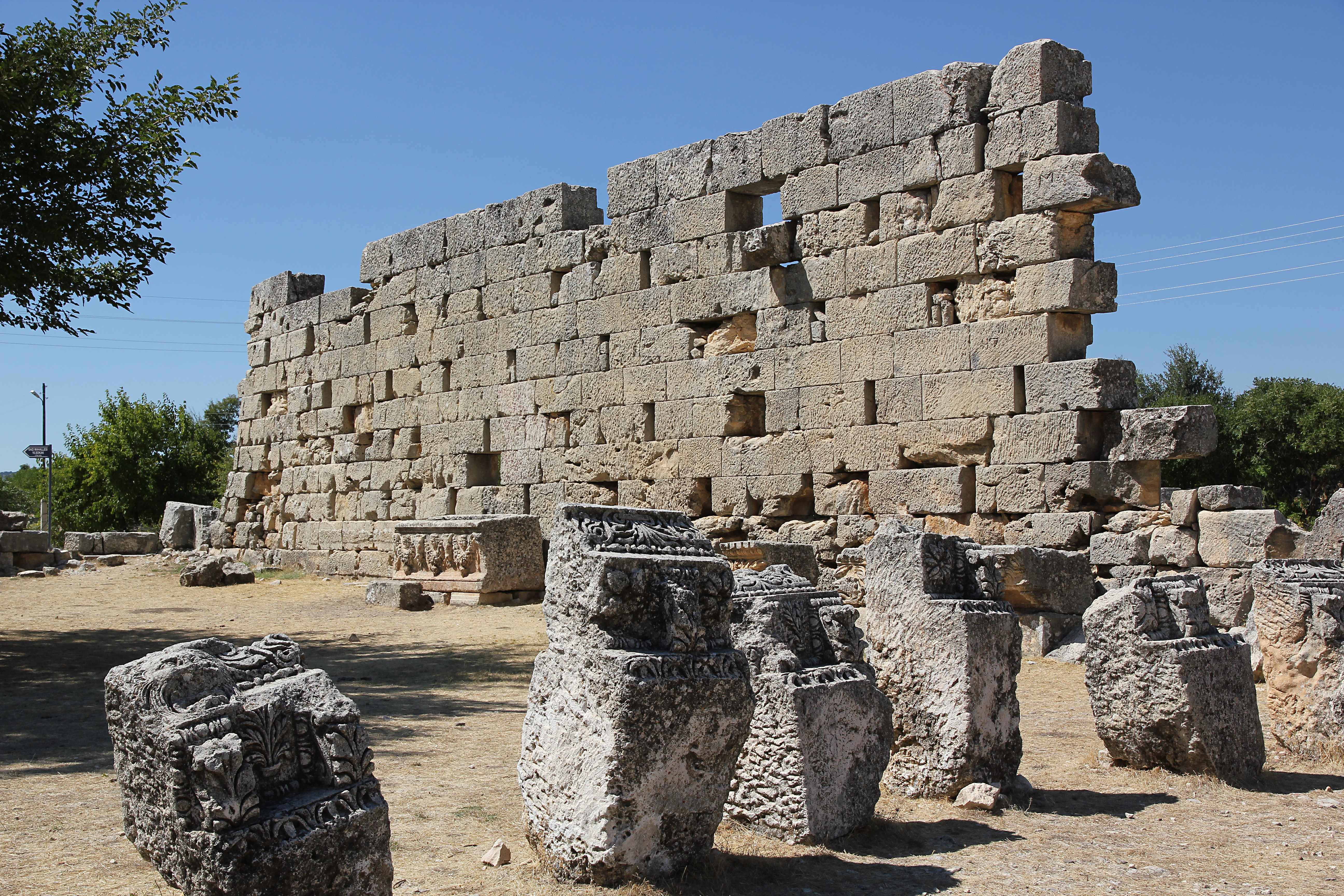 Diokaisareia, antike Stadt in Kilikien bei Uzuncaburç, Südtürkei, Temenosmauer des Zeus-Olbios-Tempels